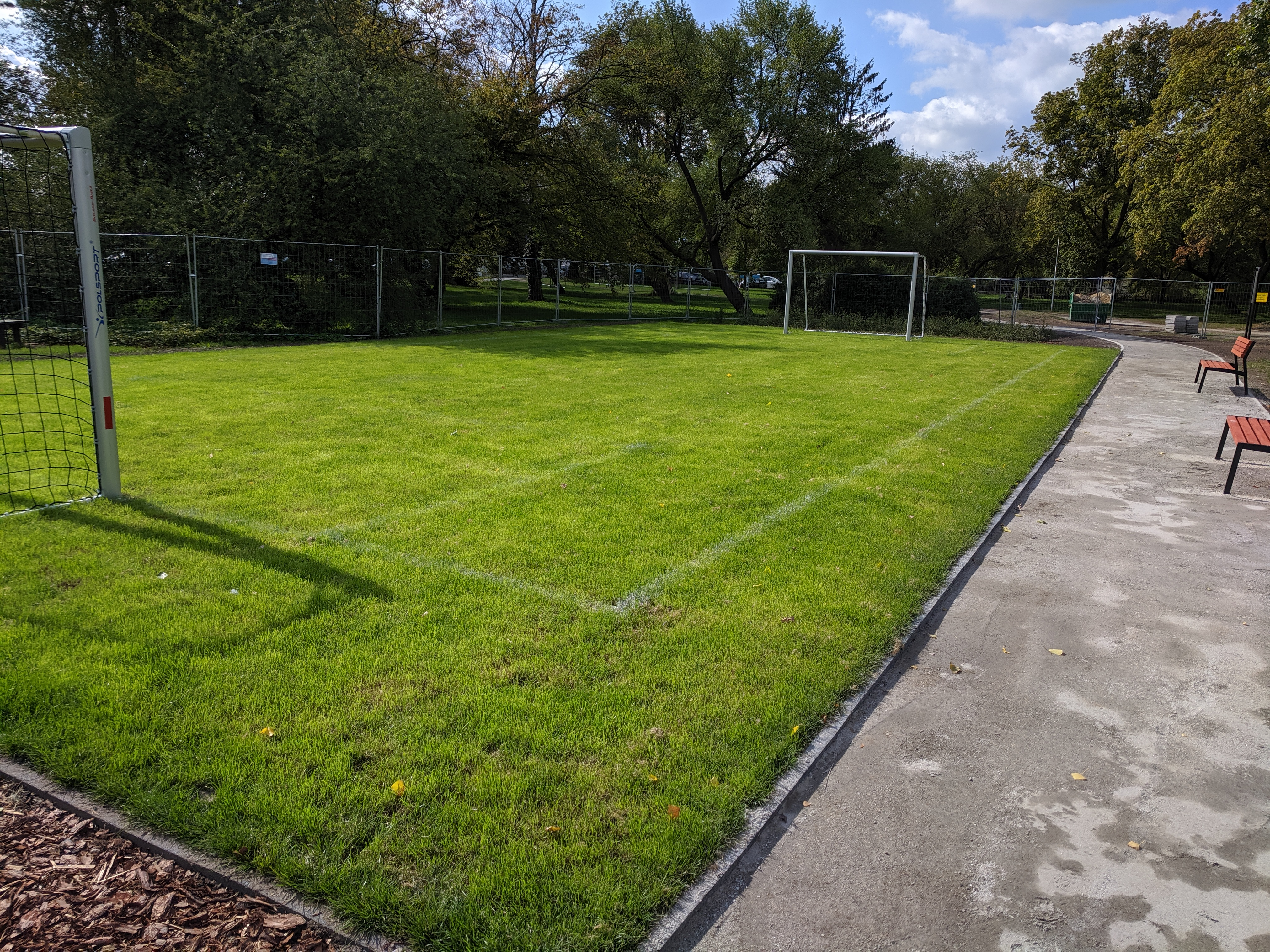 Nowowybudowane boisko w Parku Skowronim we Wrocławiu, jeszcze przed oddaniem do użytkowania (ogrodzone tymczasowym płotem)